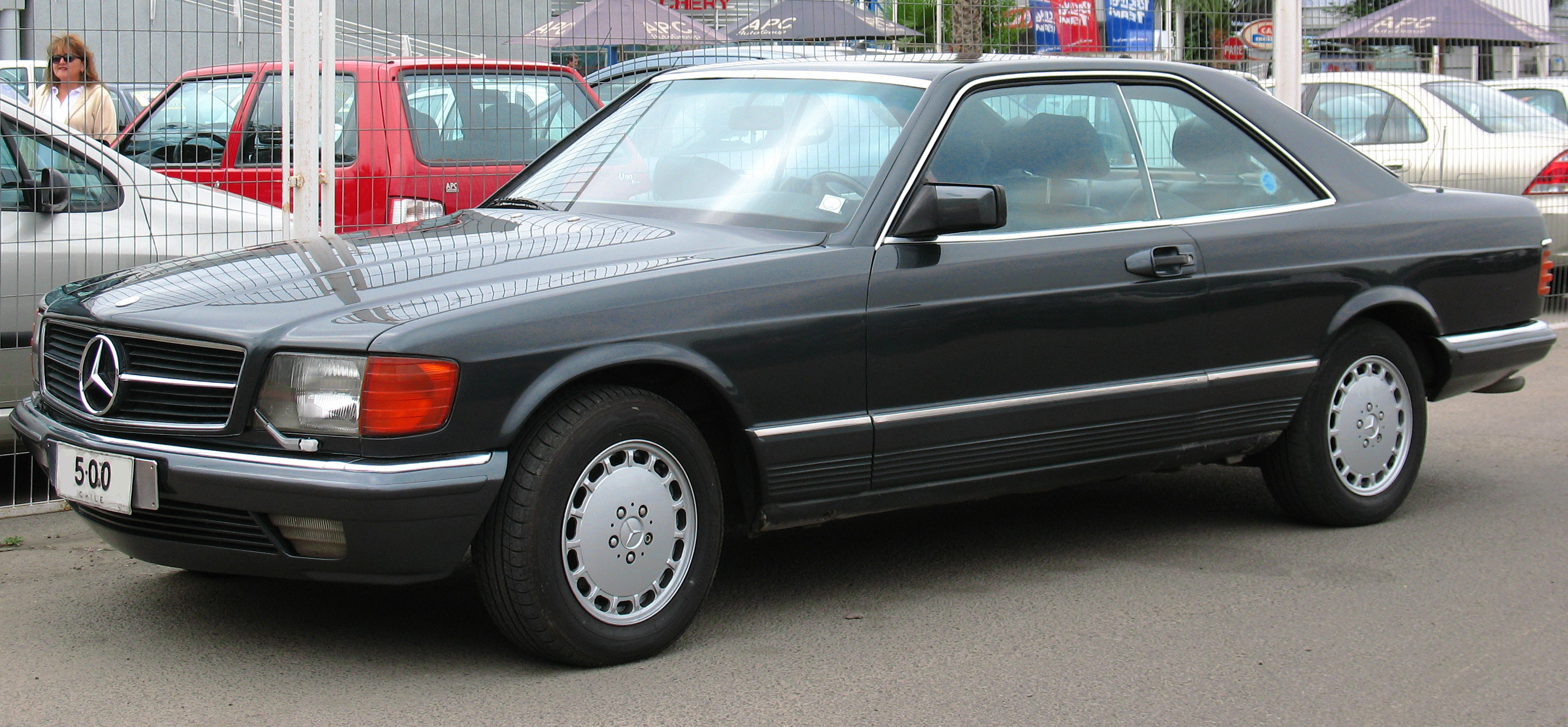 Mercedes Benz 500 SEC 1985